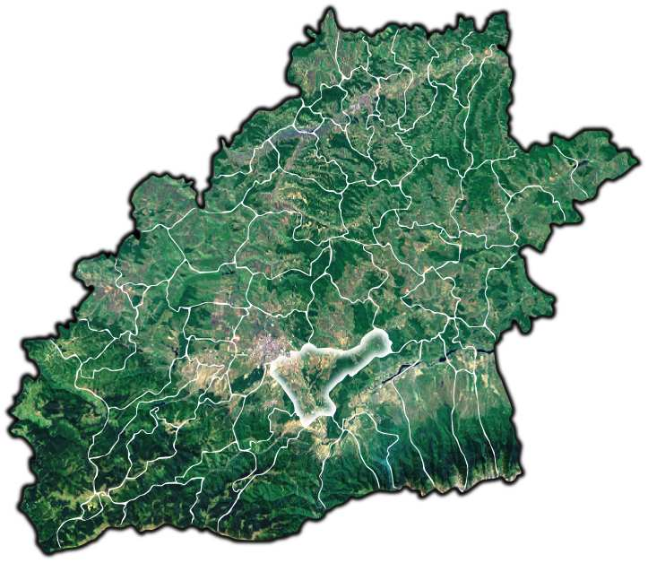 Selimbar jud Sibiu.